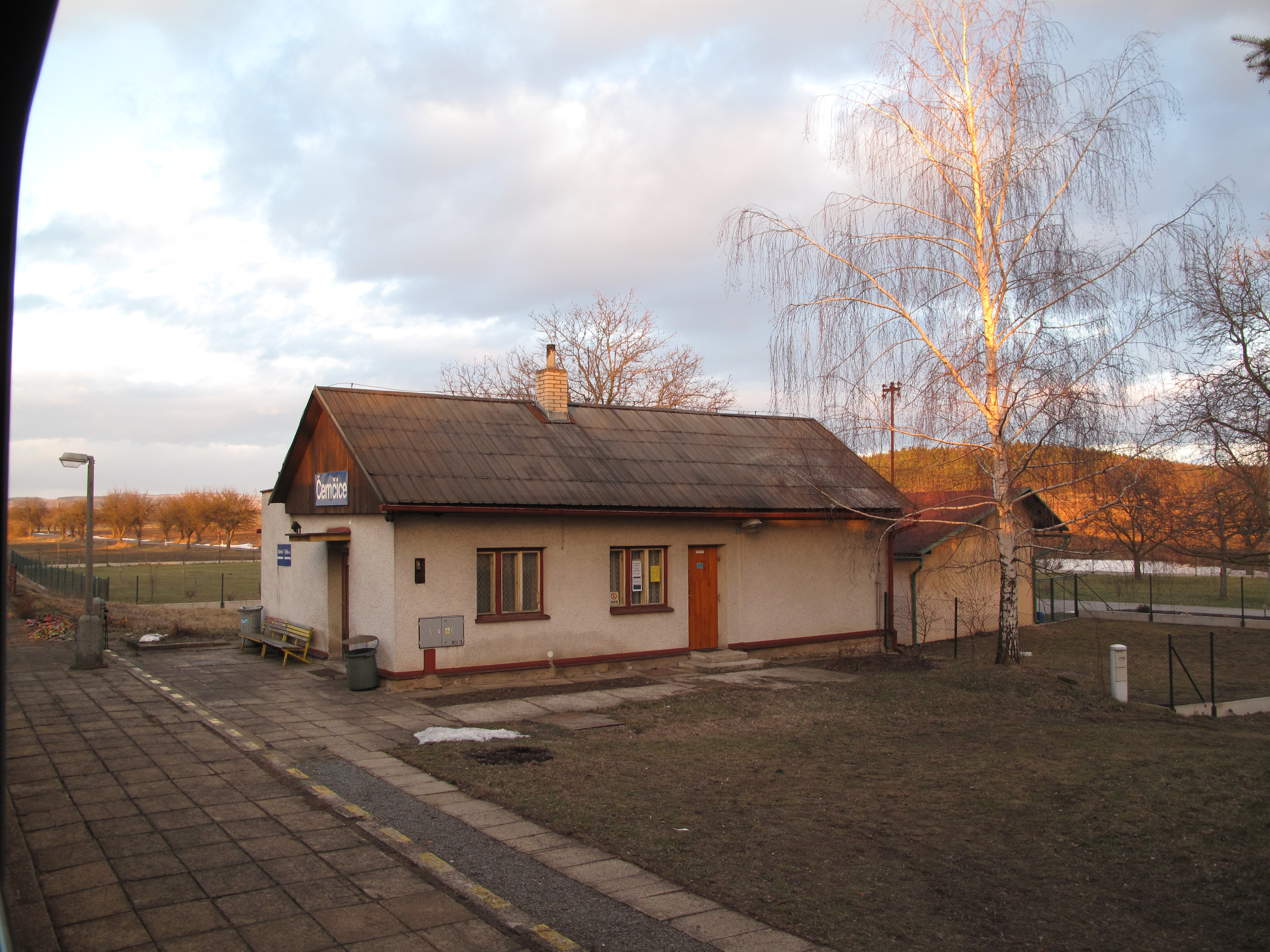 Černčice, železniční stanice